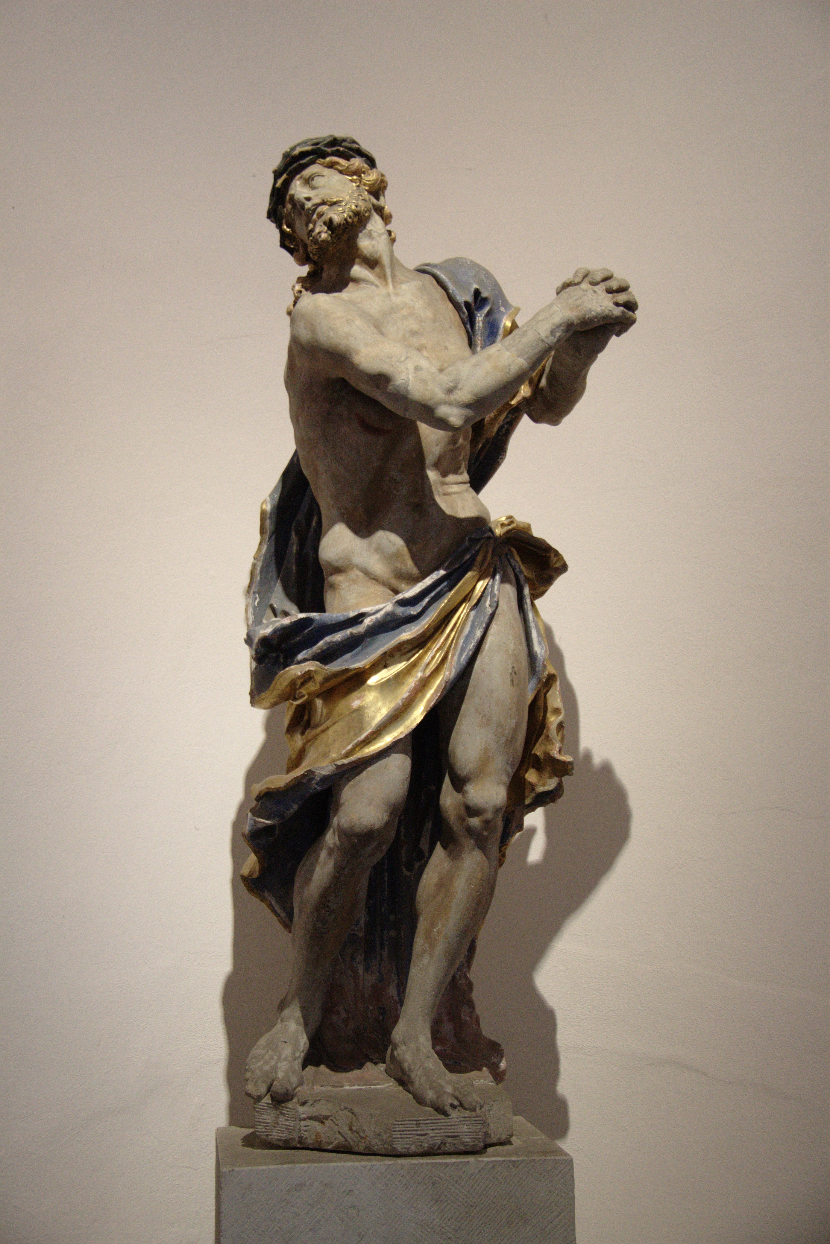 Impressionen Dresden